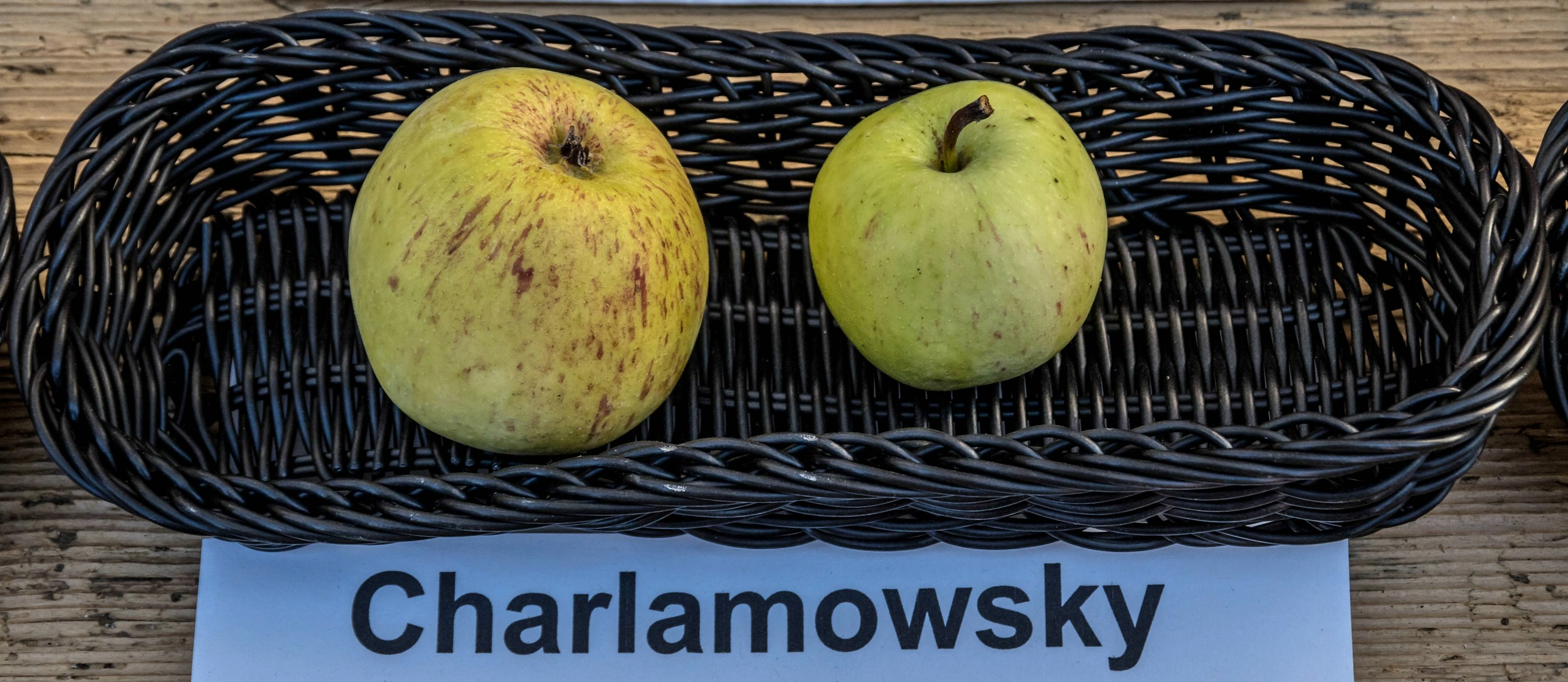 Alte Apfelsorten, von denen es im Badischen noch tragende Bäume gibt. Alle Aufnahmen au dem Oktober 2015